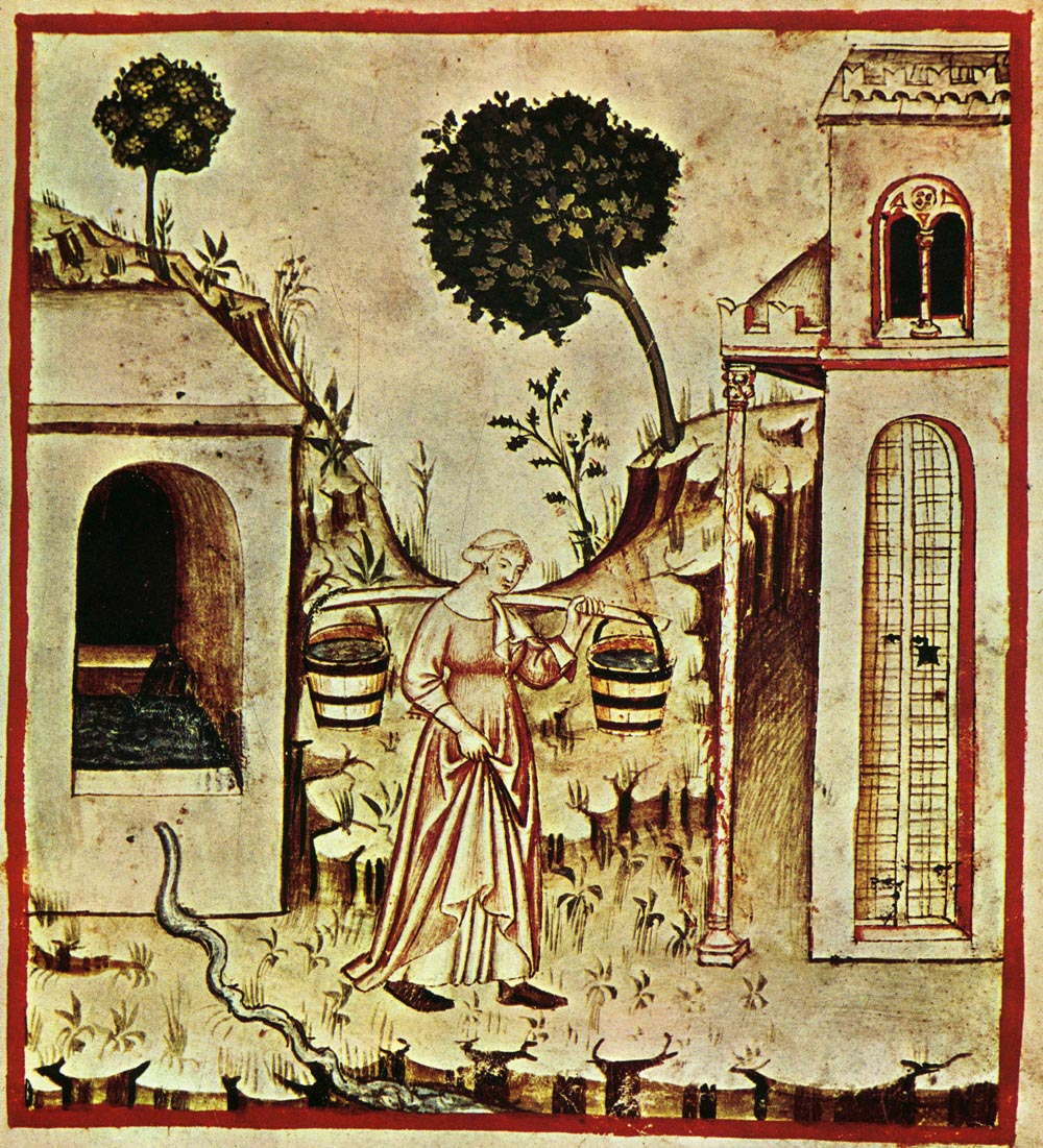 Tacuina sanitatis (XIV century) 2-alimenti, acqua dolce,Taccuino Sanitatis, Casanatense 418